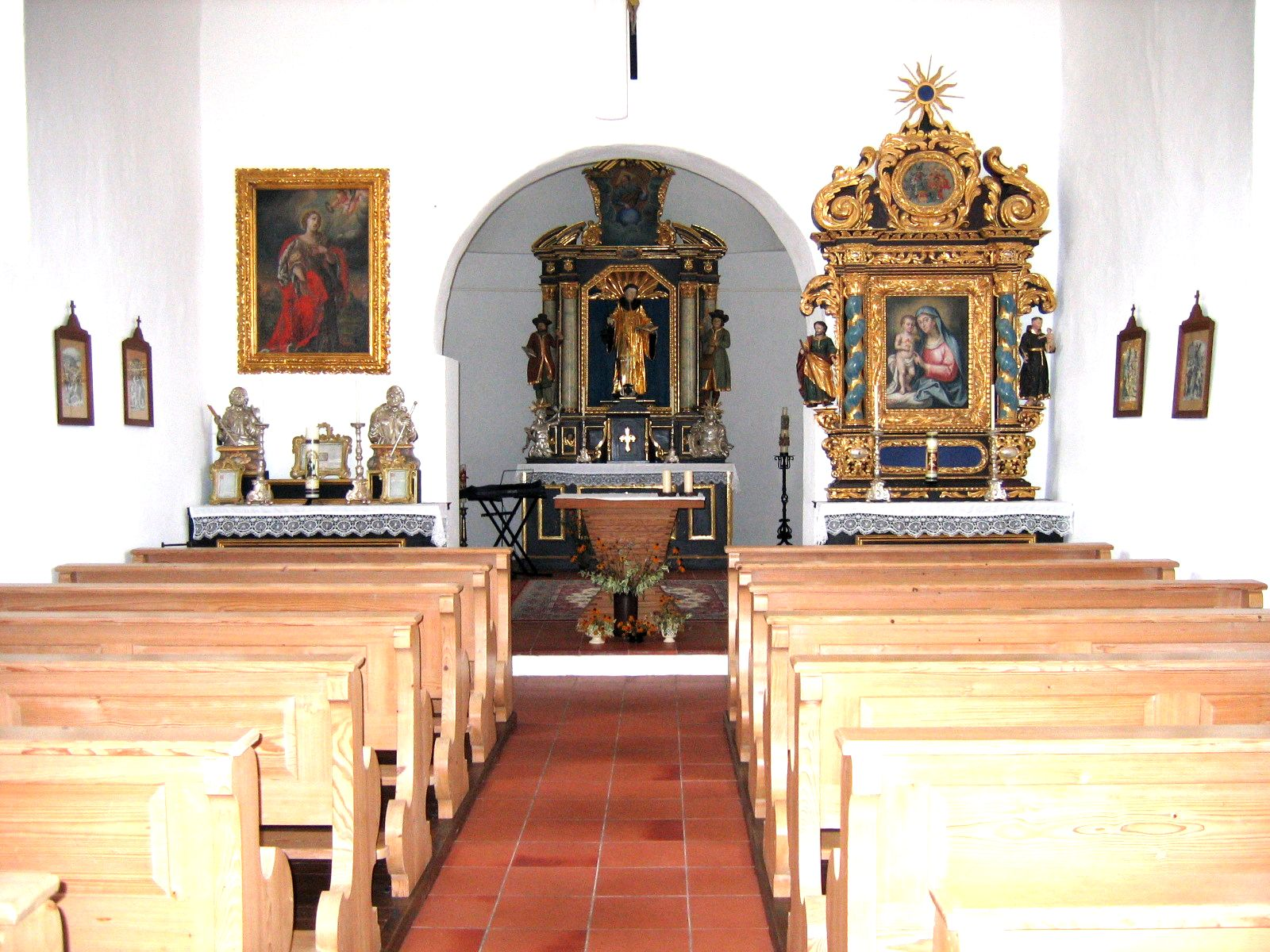 Das Leonhardskirchlein von Laisacker